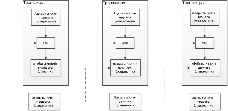 Ланцуг транзакцый Bitcoin